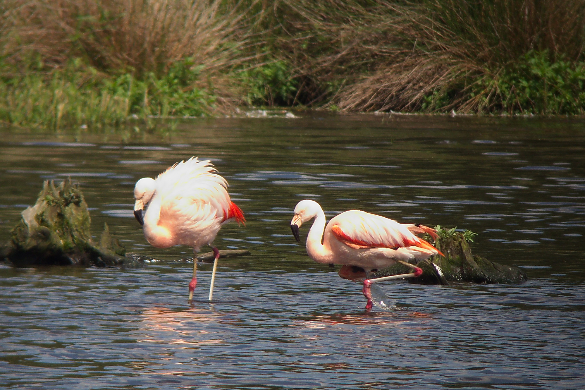 Chileflamingo (Phoenicopterus chilensis) am Zwillbrocker Venn, Nordrhein-Westfalen, Deutschland.